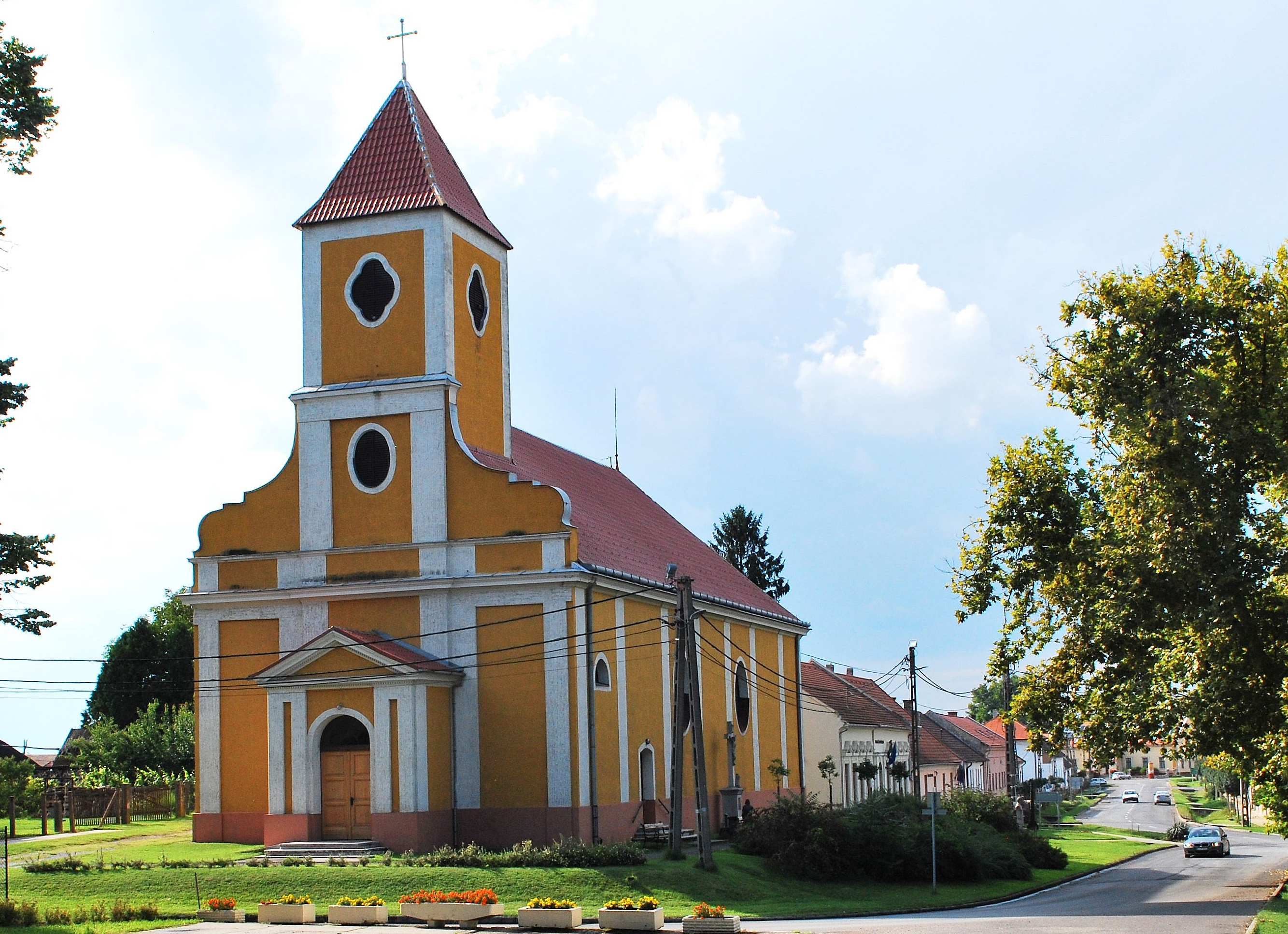 Sellyei római katolikus templom